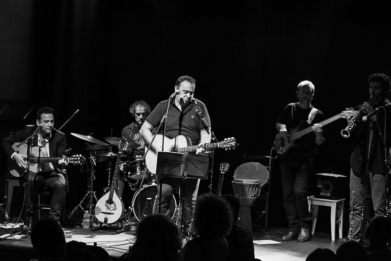 Concierto de Contradanza en Granada (Spain)